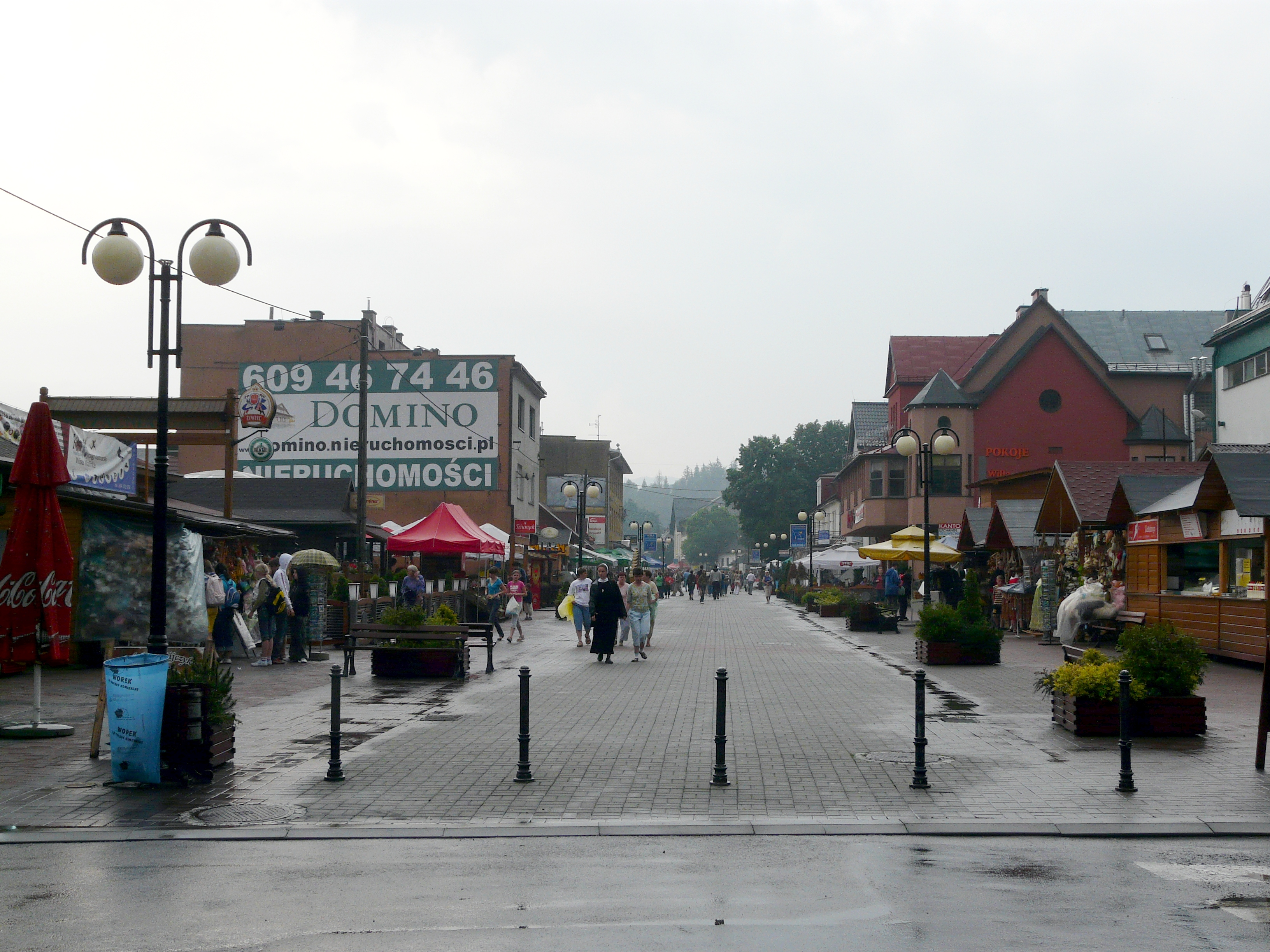 Wisła.